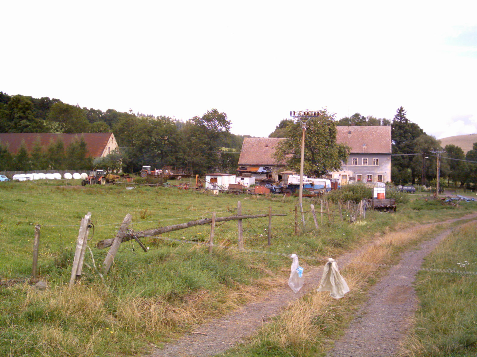 Příbram v okrese Děčín.